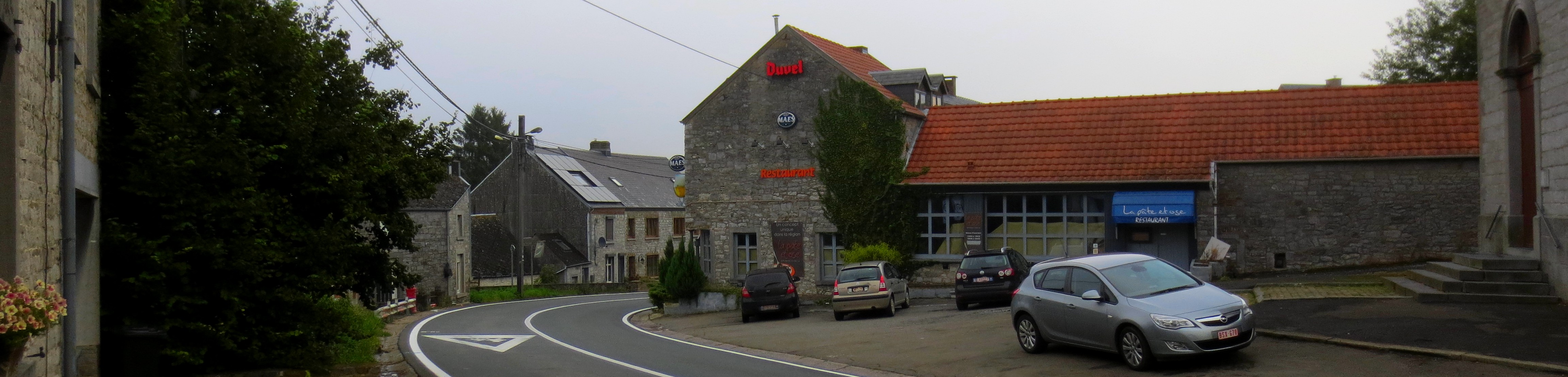 Vue panoramique d'Ermeton-sur-Biert